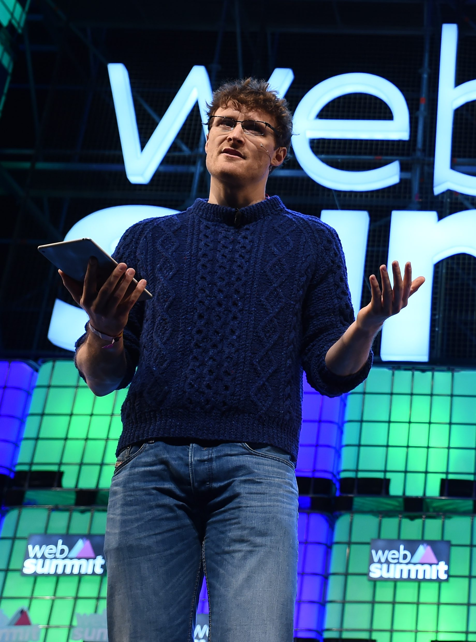 Sportsfile (Web Summit)